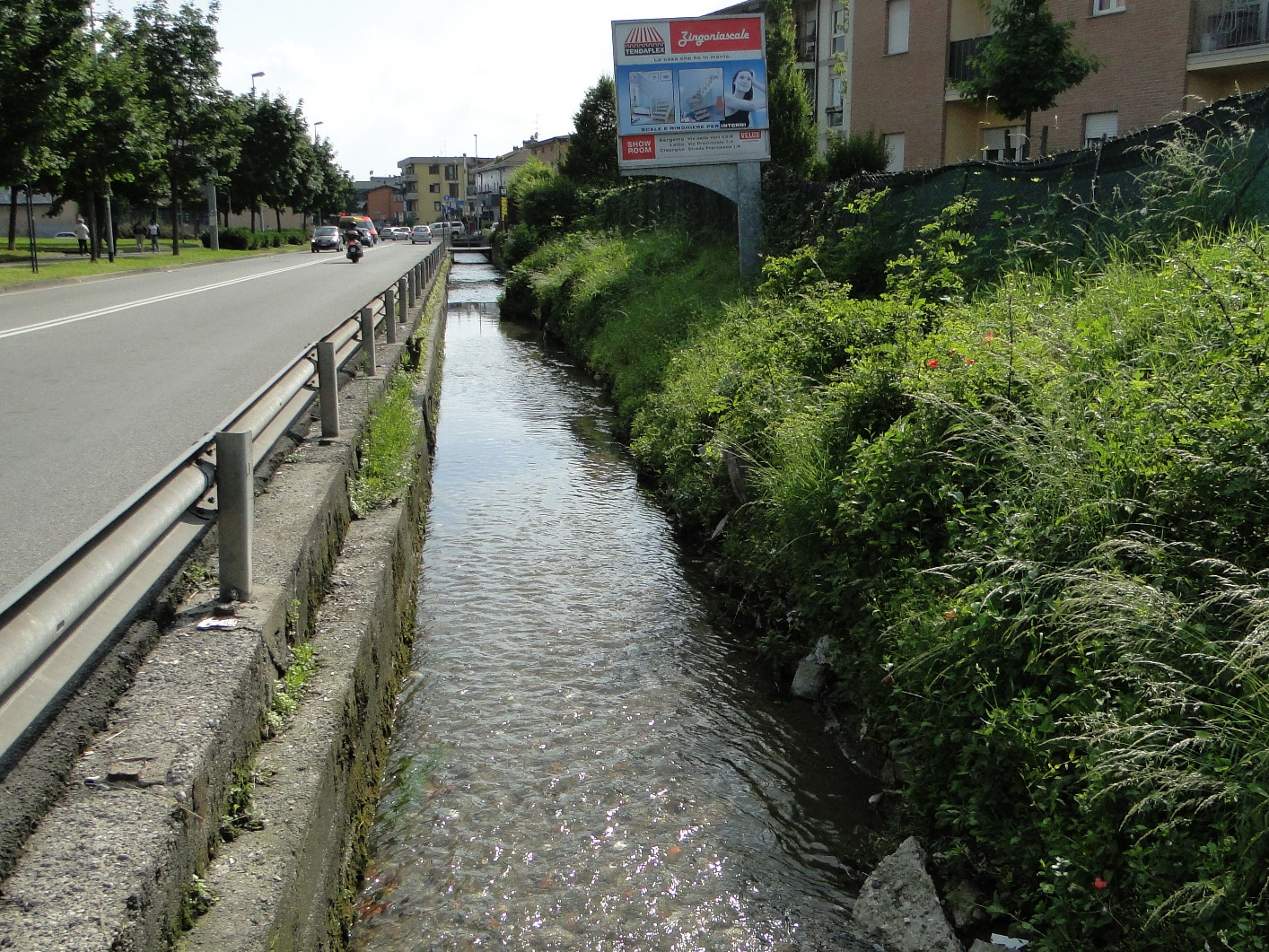 La roggia Colleonesca tra il Villaggio degli sposi e Grumello al Piano, quartieri a sud di Bergamo. Italia